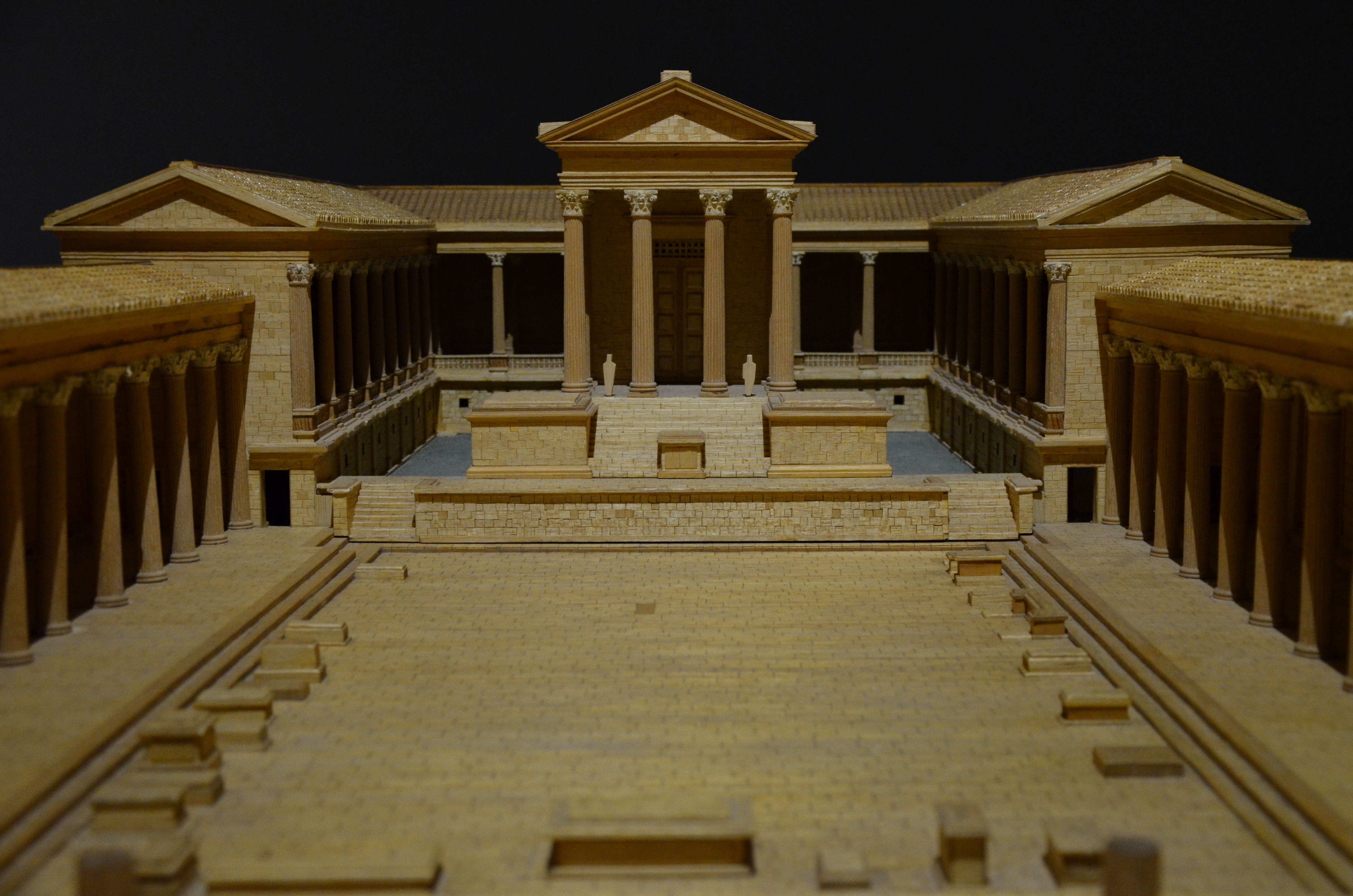 Conimbriga